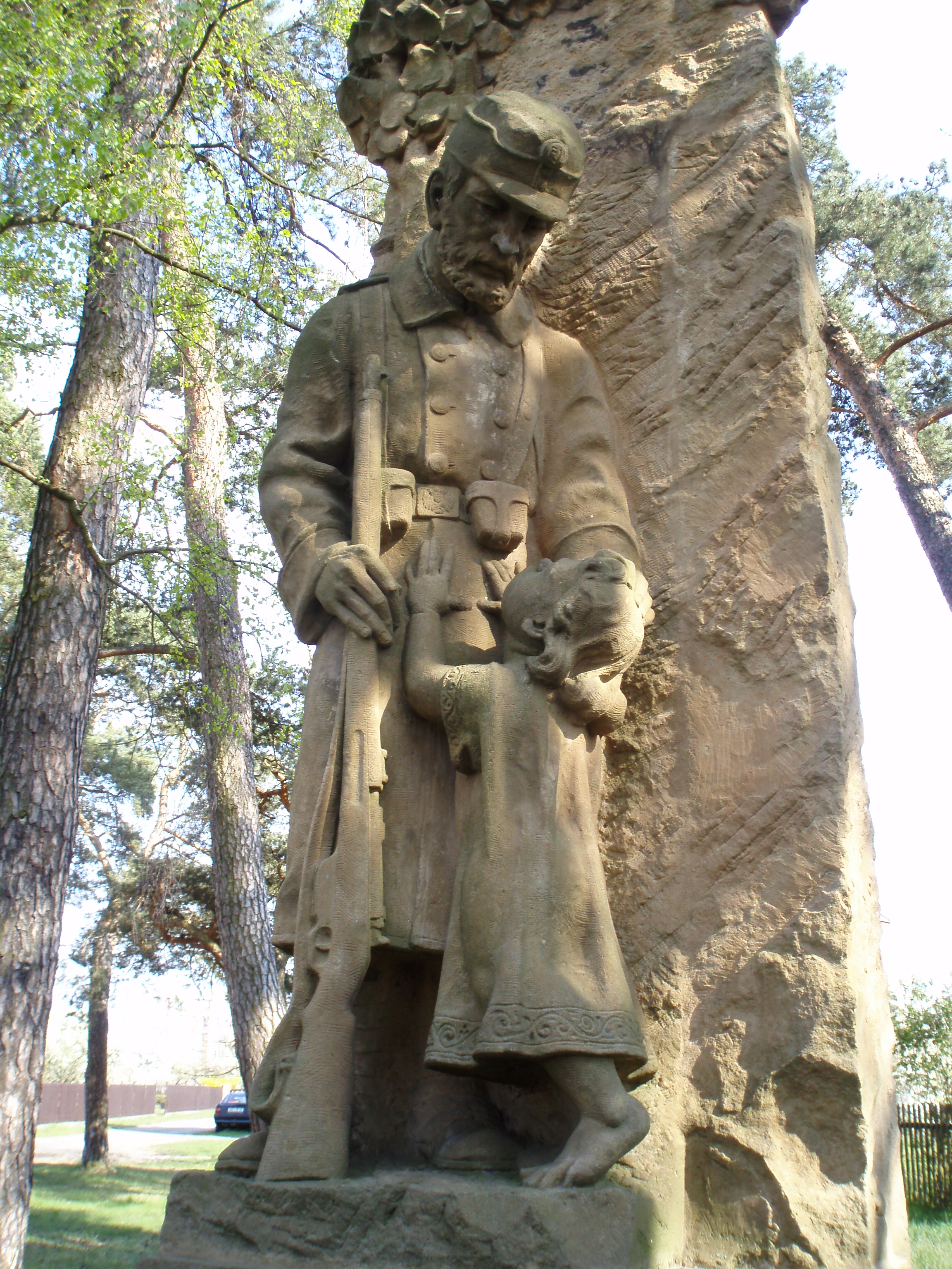 Pomník padlým v Březhradě